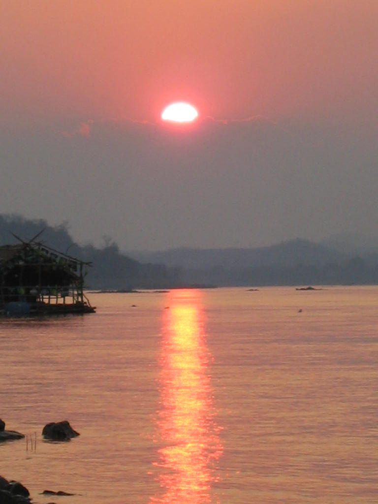 Mekong bei Chiang Khan, Foto von Martin Püschel, 24.02.2006